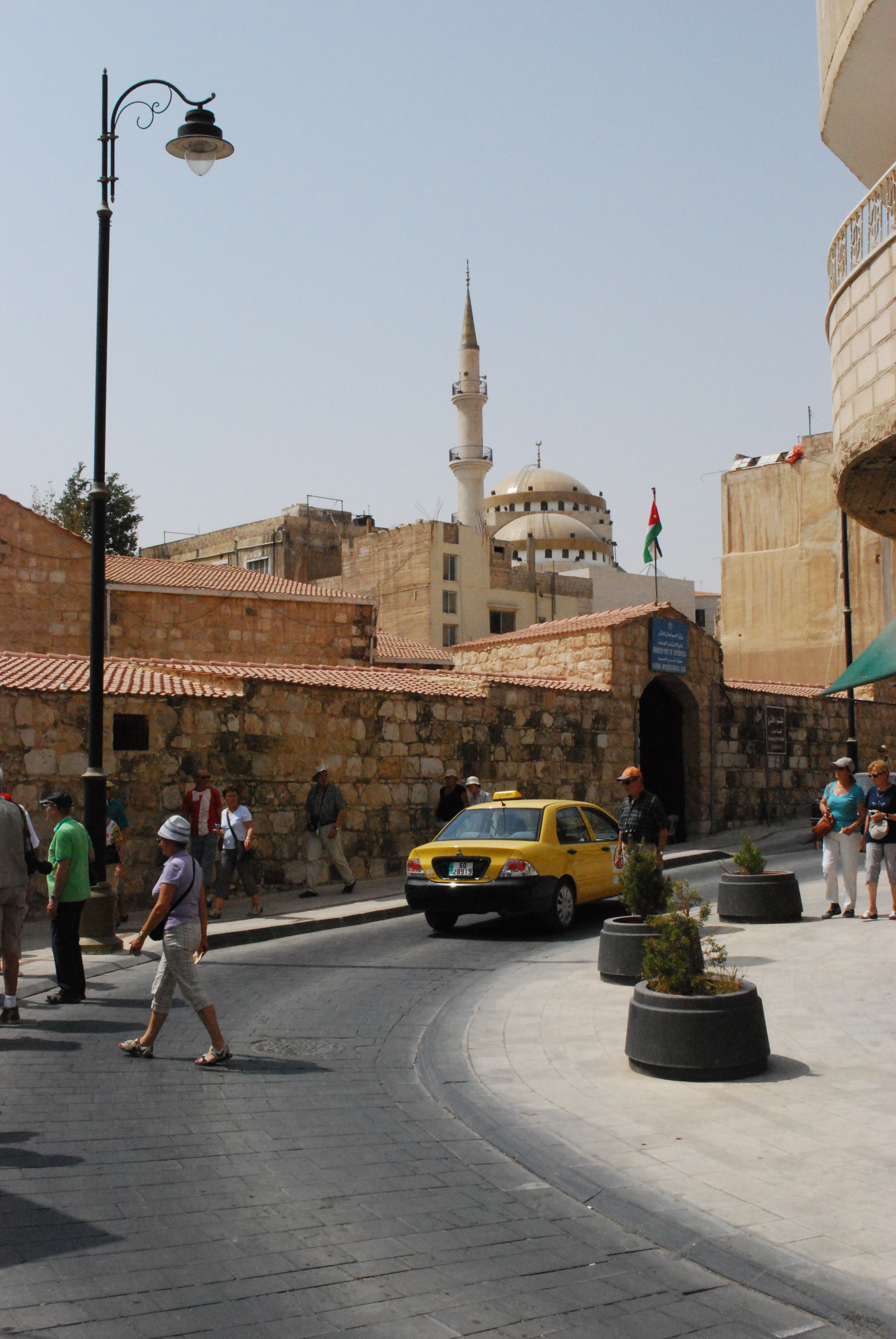 Madaba : Abu Bakr Al Siddiq Street, près centre d'accueil touristique, vers l'église Saint-Georges.